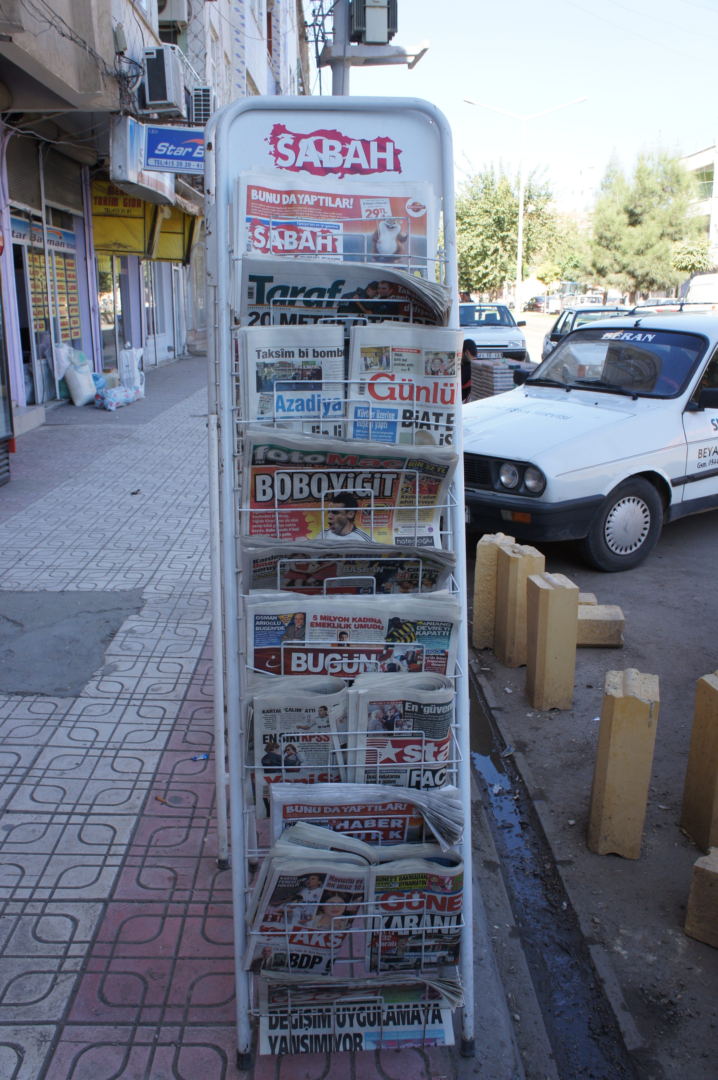 Kurdî: Rojnameyên cuda cuda li Bismilê, 2010.